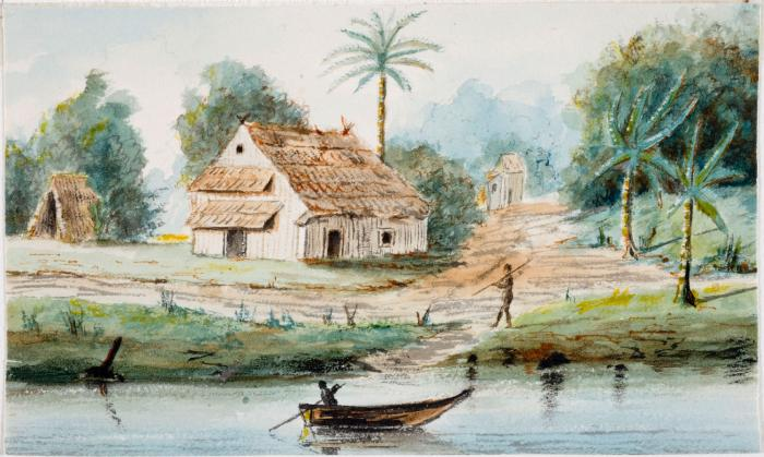 Aquarel. Oorspronkelijk behoorden deze aquarellen tot een grote kaart van de rivier de Suriname, in 1877 gemaakt door G.P.H. Zimmerman (hij heeft de metingen verricht en tekeningen gemaakt in 1865). De rivier was daarbij omgeven door 21 kleine aquarelletjes die voorstellingen toonden van mensen, huizen, landschappen etc. in Suriname. G.P.H. Zimmerman was luitenant bij de Infanterie en verbleef rond 1860 in Suriname. Hij bracht de Suriname rivier in kaart en vervaardigde een aantal aquarellen van militaire posten, plantages, stads- en riviergezichten. Deze auqarellen zijn verwijderd en in groepen in passepartouts gedaan: L,O,H,P,N als dorpsgezichten, evenals M,F,T,D,E,J,C,I,K; en S,A,B,G,Q,Z,V met bevolkingstypen. De kaart zelf kreeg het nummer 1138-17-a-1, en werd in 1877 voor rekening van het Aardrijkskundig Genootschap gedrukt. Op de kaart staat bovenaan vermeld: "Tijdschrift Aardrijkskundig Genootschap Deel II". De kaart is uitgevoerd op schaal 1:150.000 - Noordoostkust Zuid-Amerika, schaal 1:750.000 - Monding Suriname-rivier, schaal 1:100.000 - Plattegrond Paramaribo - Twee doorsneden van bodemprofielen - opgave van enkele voortbrengselen van de oevers der Suriname Het oorspronkelijke geheel werd een paar malen op tentoonstellingen bekroond.. Aquarel voorstellende een Bosnegerkamp bij Berg en Daal